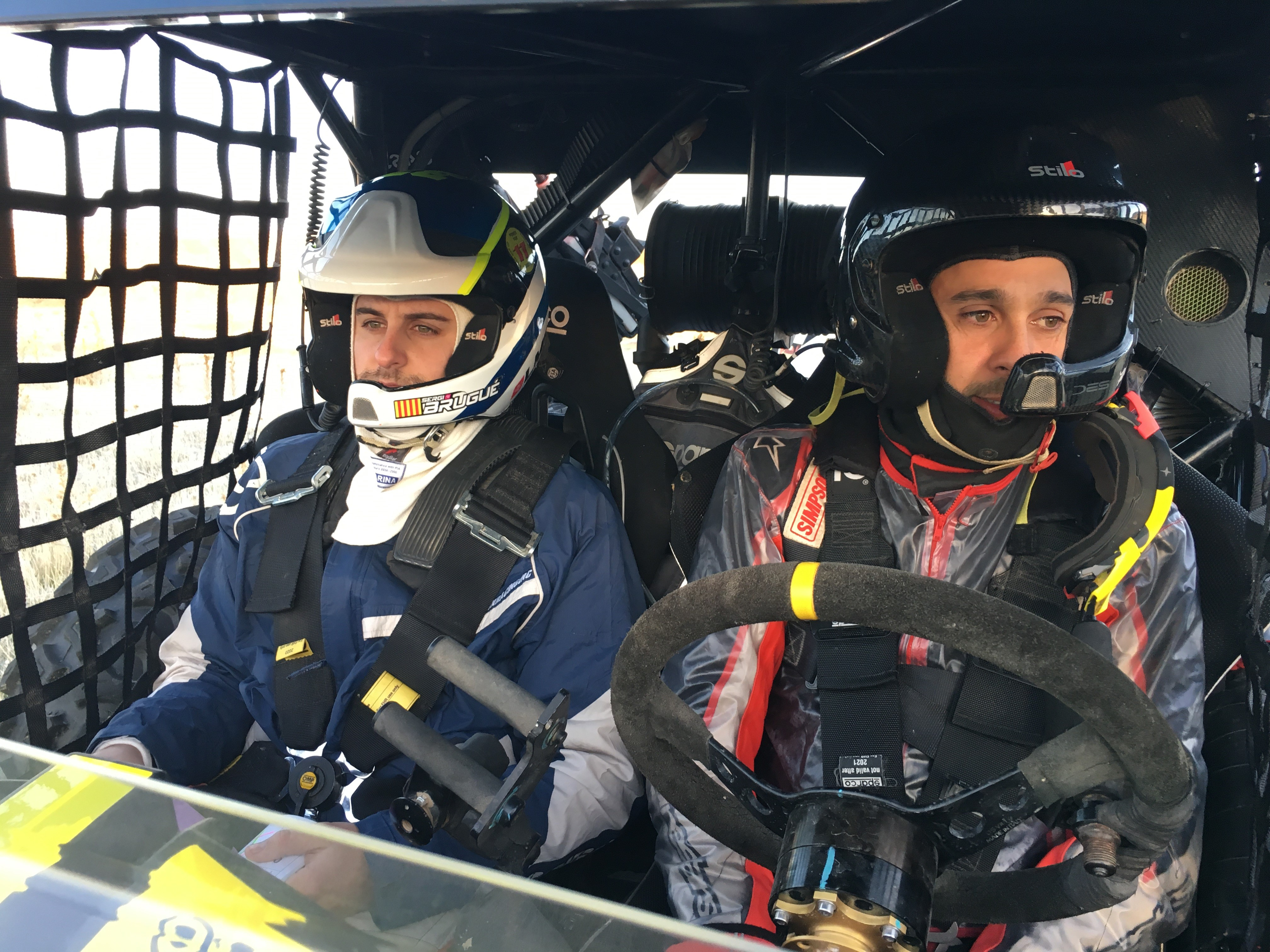 Tram sortida enllaç Rally TT Cuenca 2016